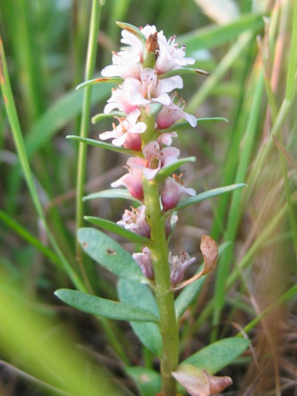 Strand-Milchkraut Glaux maritima, Zingst